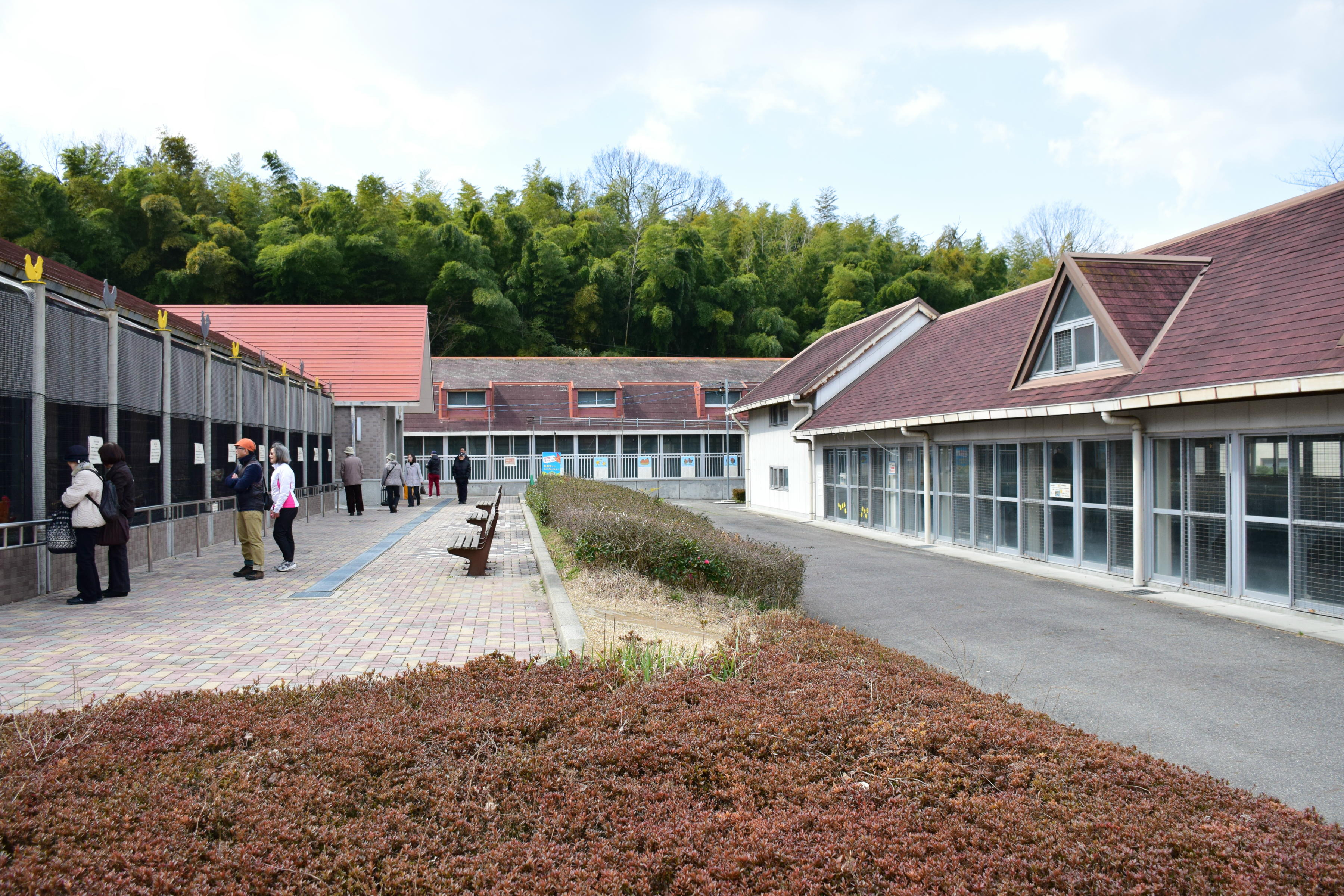 農業センター畜産施設